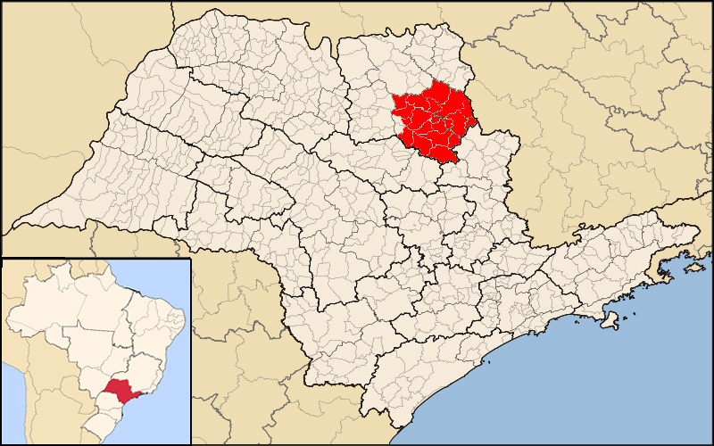 Mappa dell'arcidiocesi di Ribeirão Preto, nello stato di San Paolo, Brasile. Fonte per i confini della diocesi